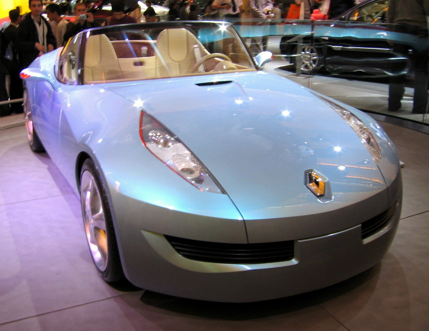 Face avant du véhicule conceptuel Renault Wind.